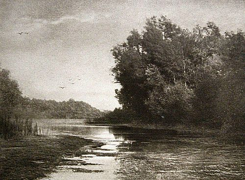 Hans Watzek An der Donau [Wiener Photographische Blätter: Herausgegeben Vom Camera-Club In Wien] 1894, June